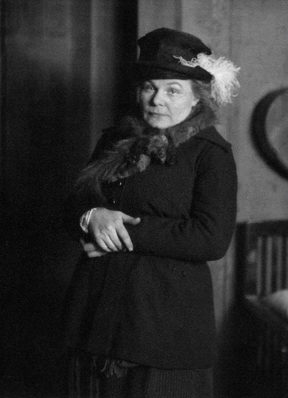 Skådespelaren Anna Hammarén (1888–1972). Scenbild ur Stora barndopet på Helsingborgs stadsteater.